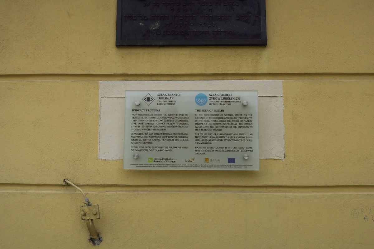 Tablica informująca o szlakach turystycznych pod tablicą upamiętniająca Widzącego z Lublina przy placu Zamkowym w Lublinie